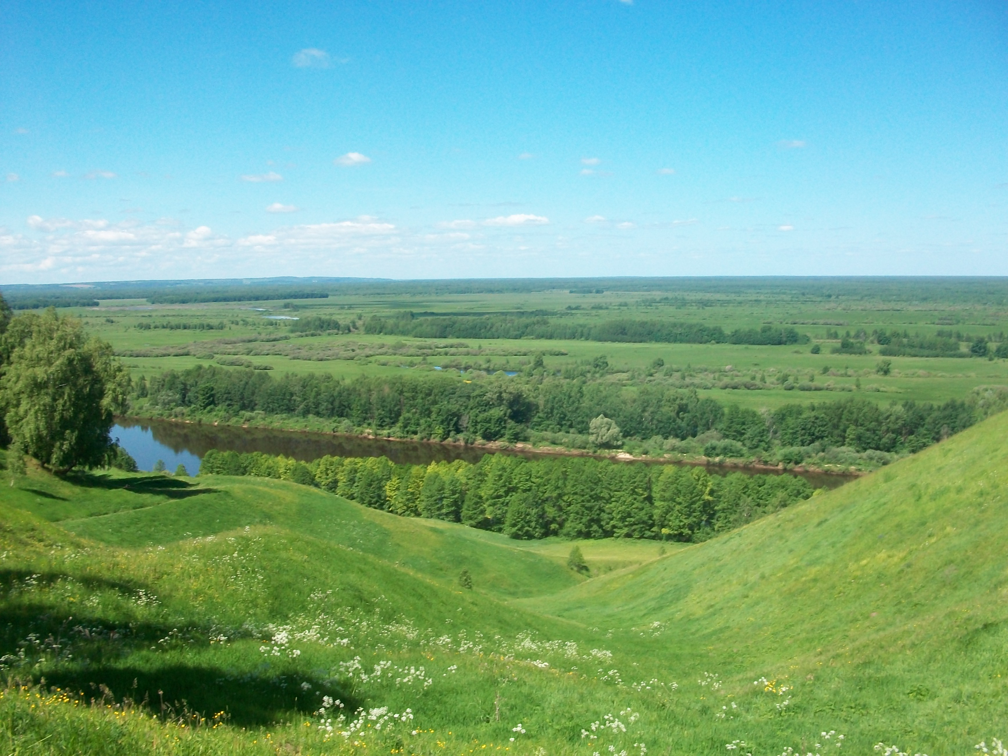 Городище "Лысая Гора": 0.1 км севернее деревни, правый берег р. Клязьма, Городище, Гороховецкий район, Владимирская область